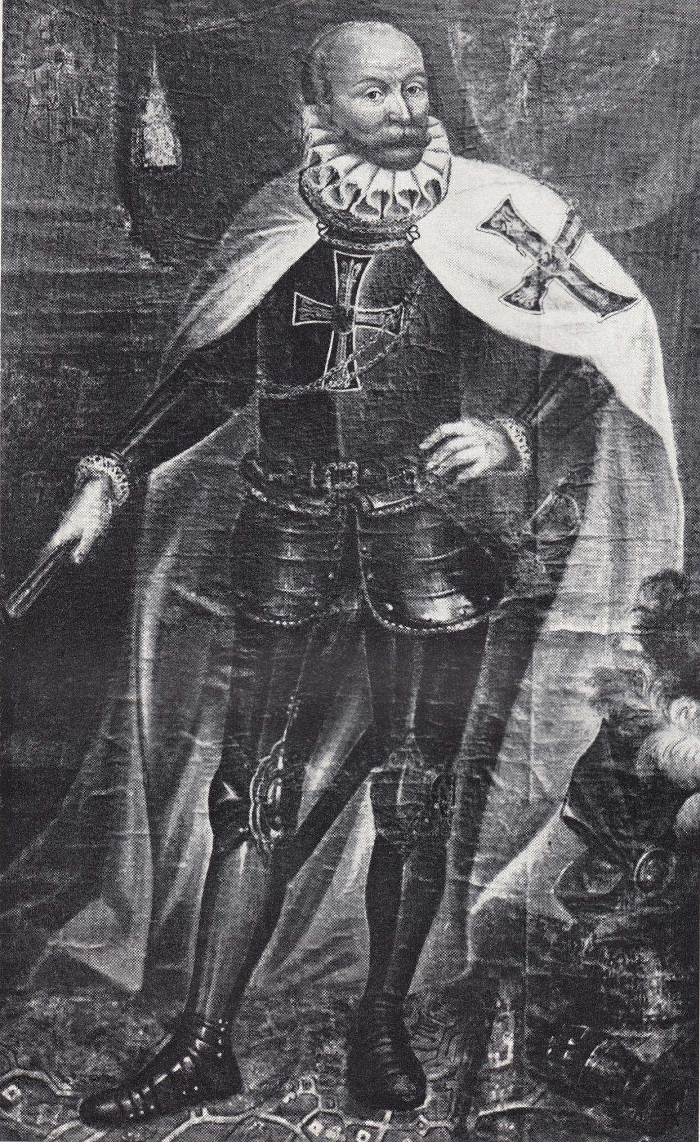 Joh. Eustach von Westernach zu Kronburg, Deutschmeister, 1545-1627